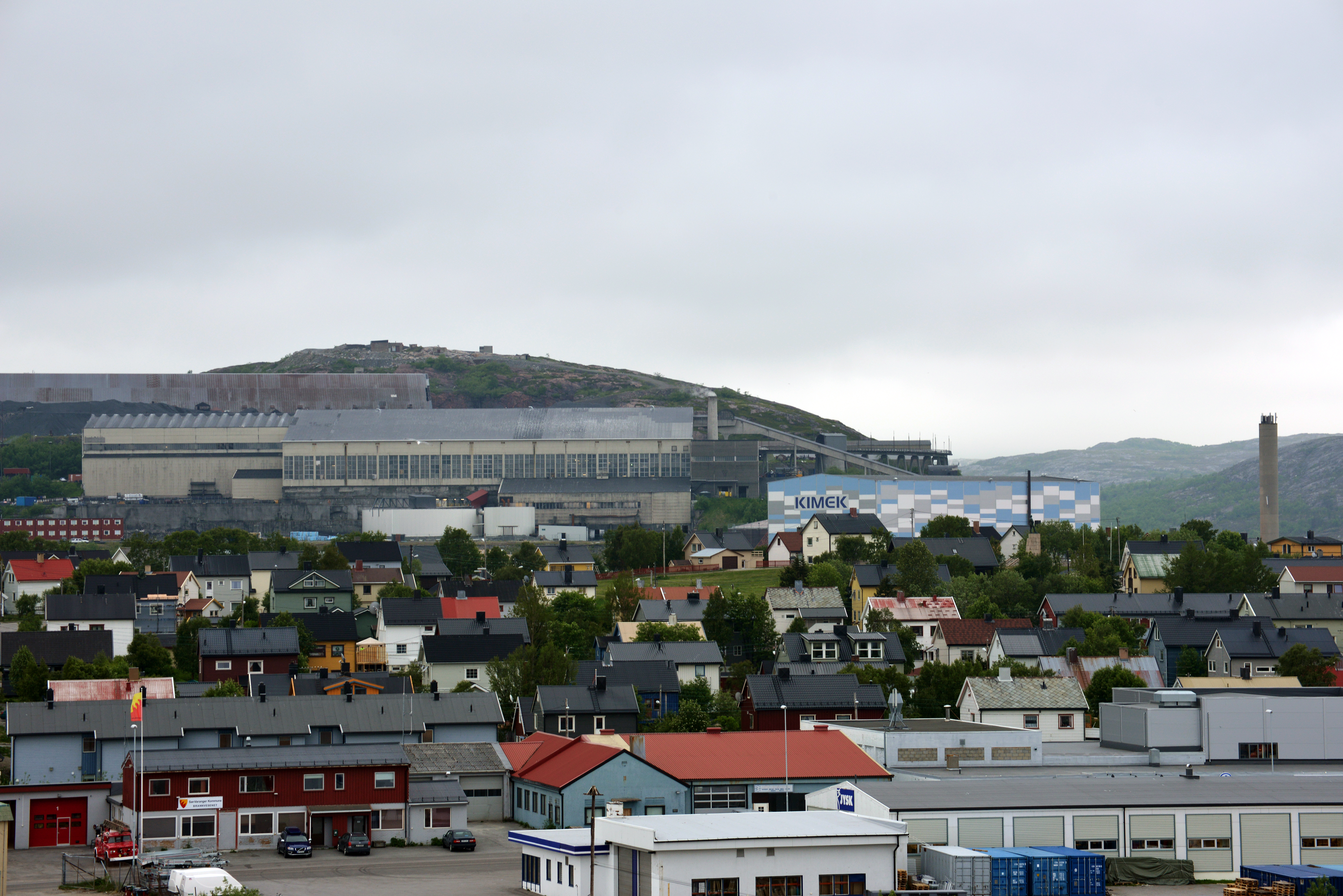 more Port of Kirkenes